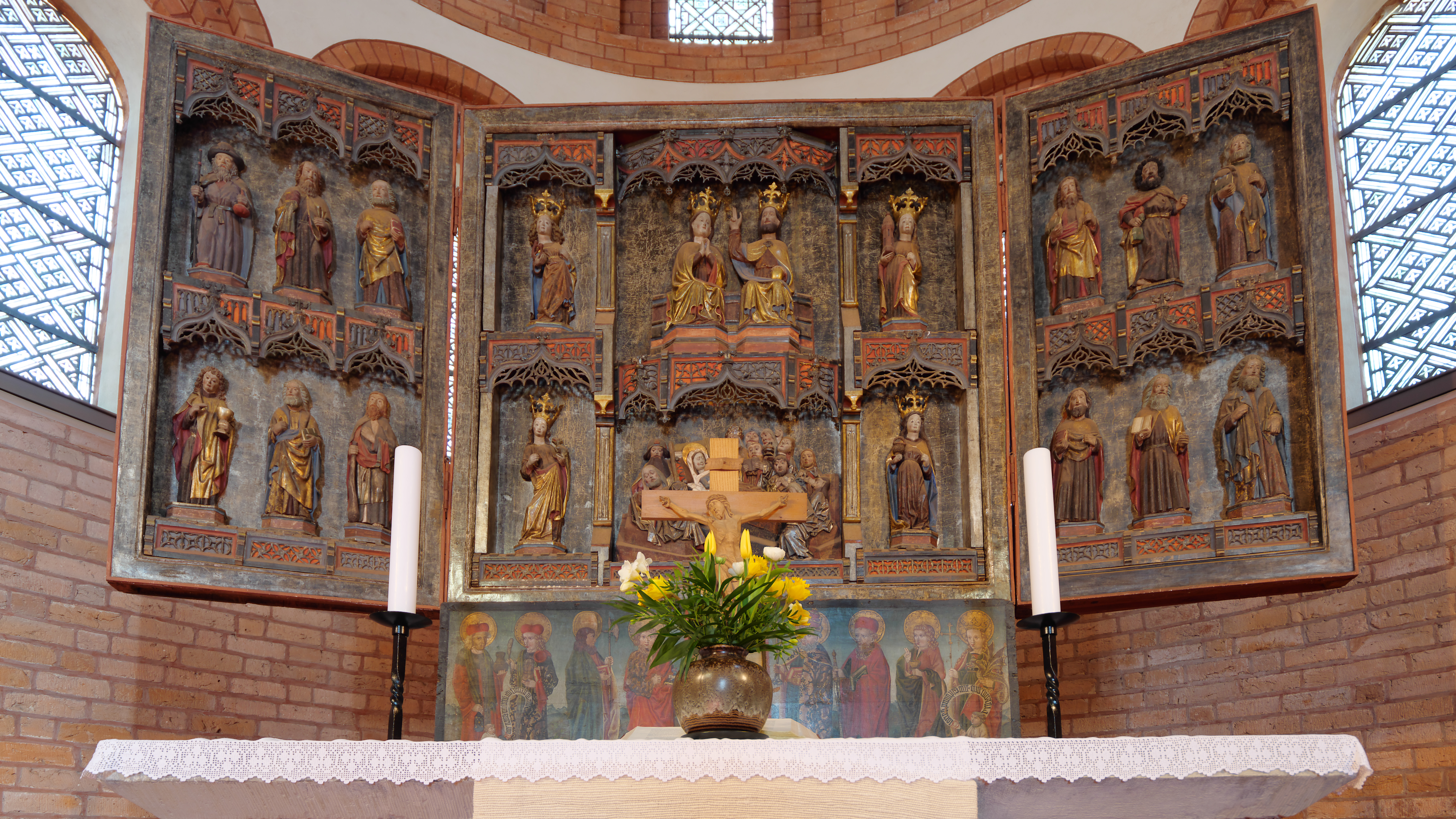 Kloster Lehnin, Tryptichon im Altarraum